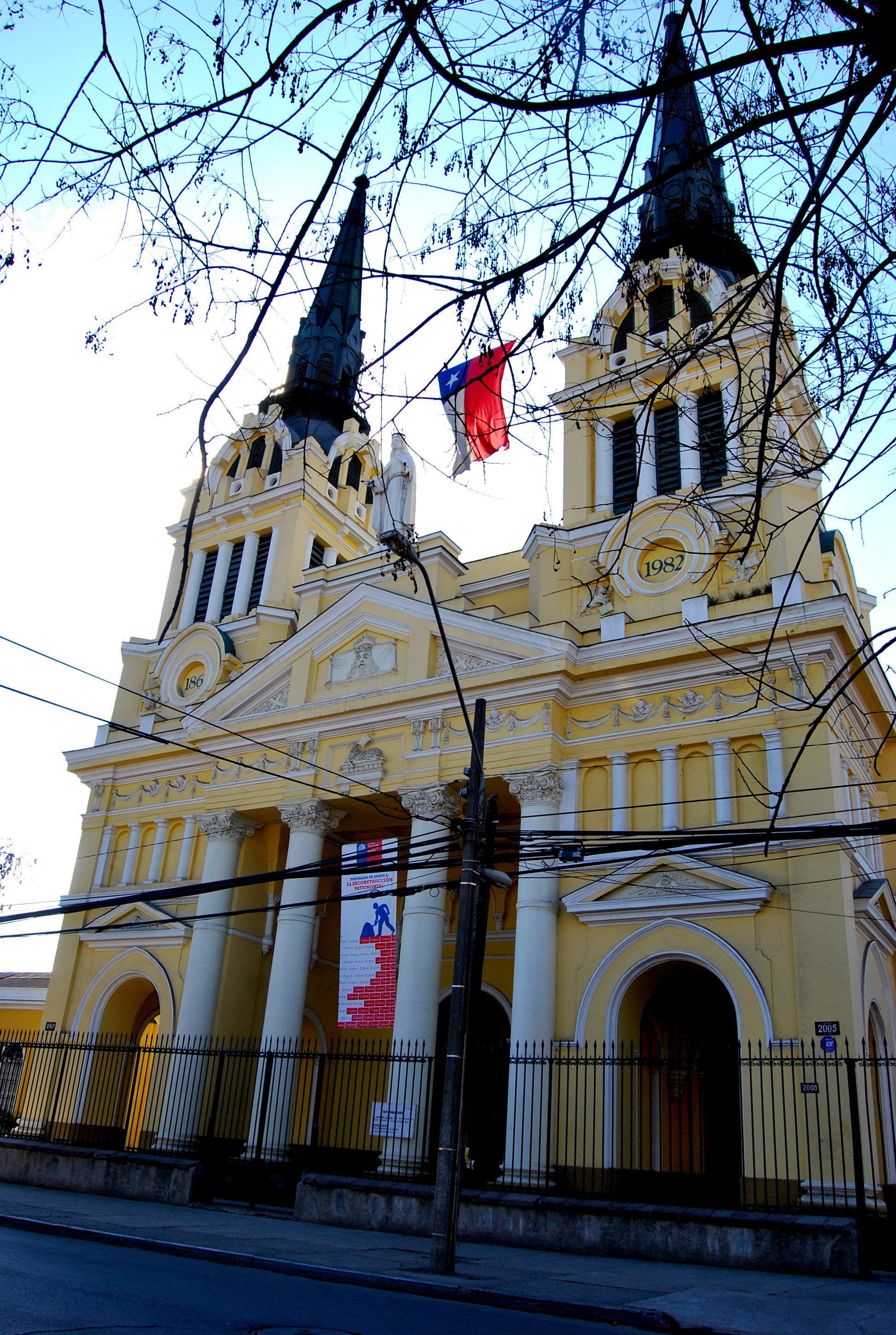 Iglesia y convento del Buen Pastor This is a photo of a national monument in Chile: 223